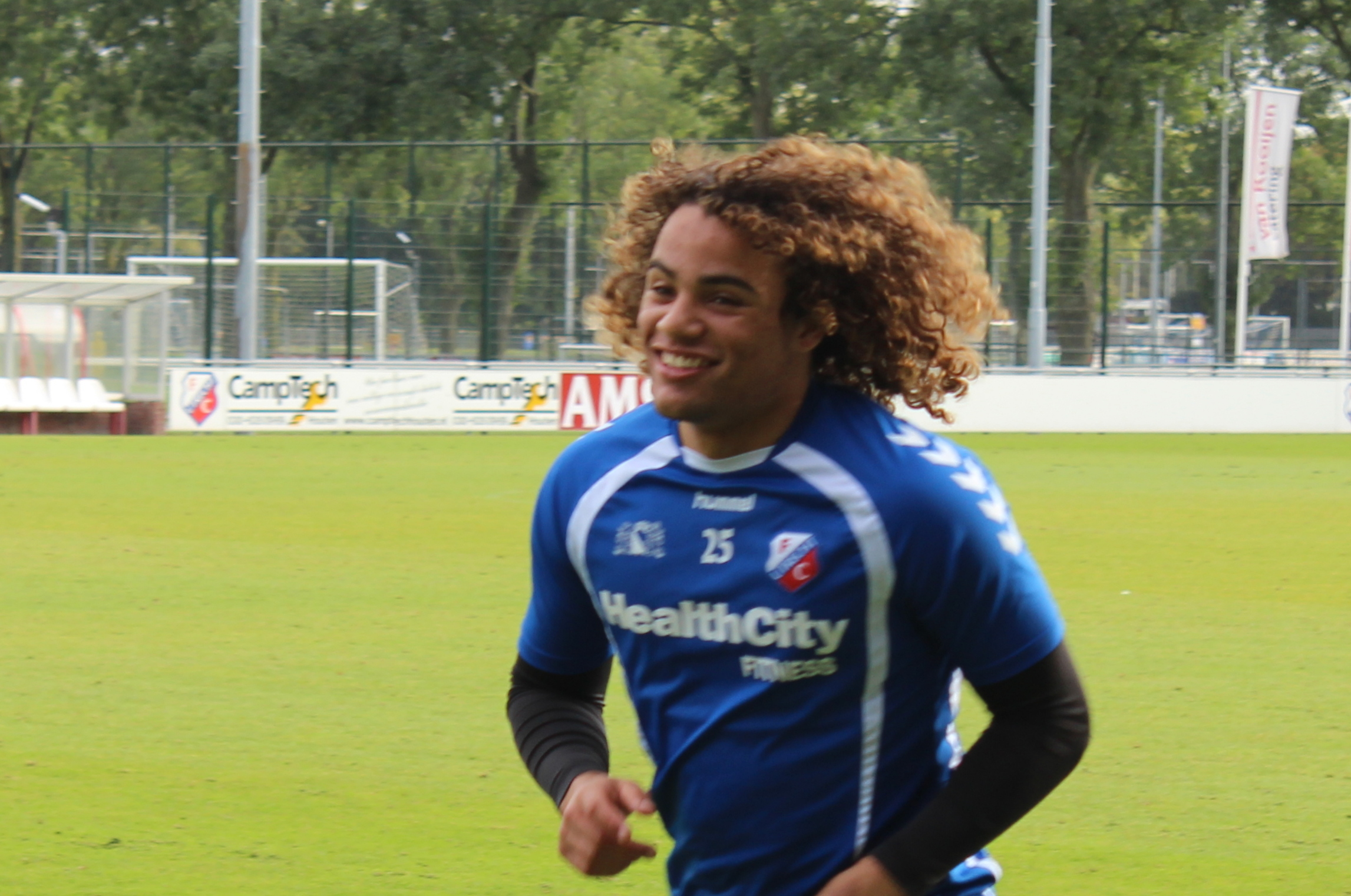 Kenny Teijsse